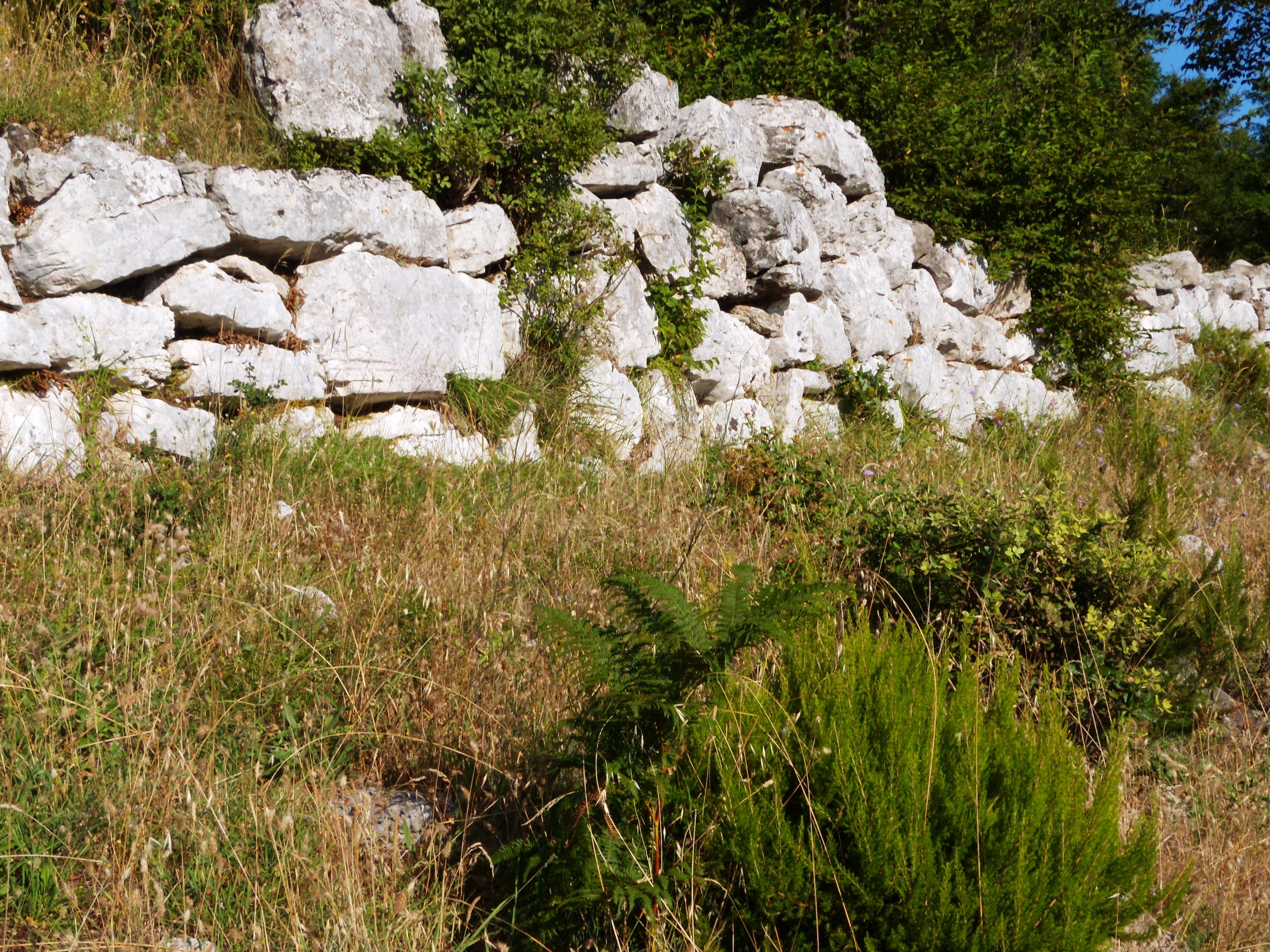 Mura megalitiche osco sannite che costituiscono l'Arce di Monte Acero.